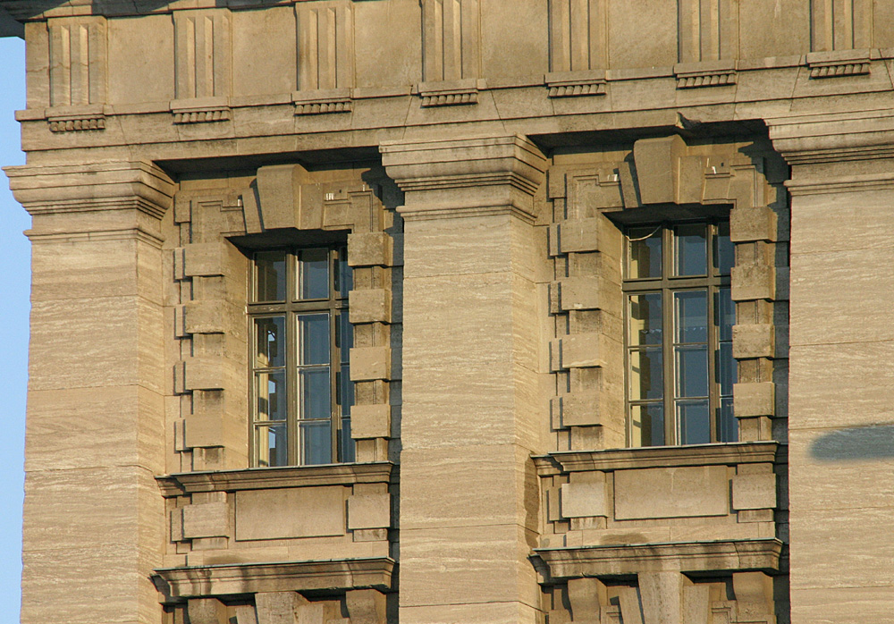 Berlin, Stadthaus, window frame details author: Elke Wetzig (elya) date: 2005-12-30